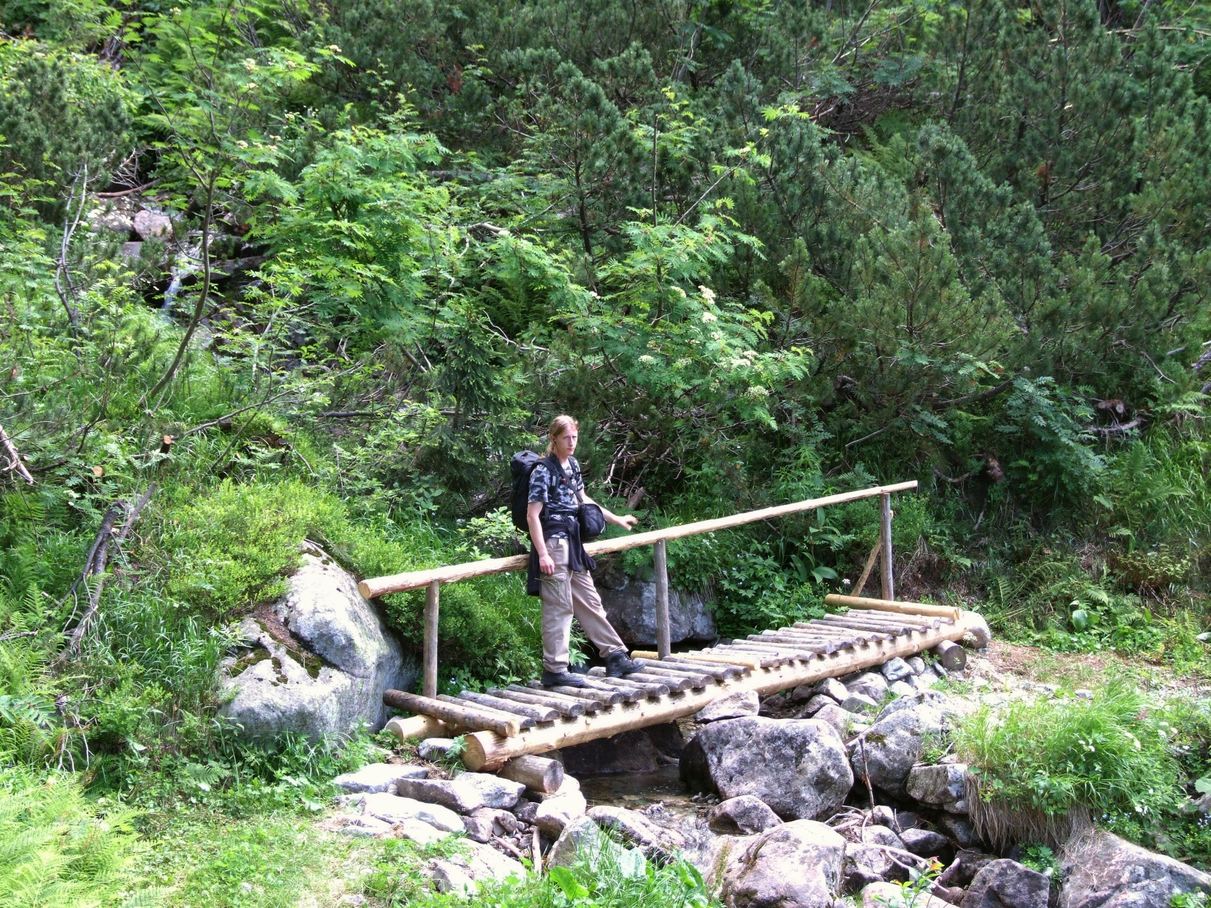 Tichá dolina. Potoczek spływający spod Liliowego